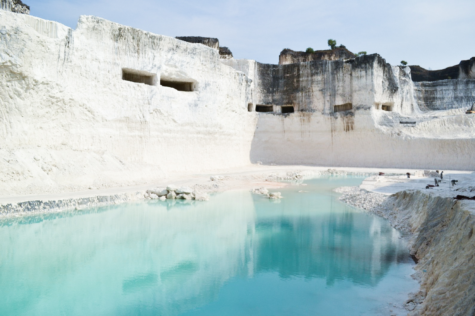 Foto ini diambil di Bukit Jaddih Bangkalan, Madura. Bukit ini terletak di Bukit ini ini merupakan tambang kapur yang terletak di Kecamatan Socah, Desa Jaddih Kabupaten Bangkalan Madura, Jawa Timur. Selain pemandangan tembang kapur yang putih berish, terdapat pula suatu kolam yang berwarna biru cerah. Masyarakat meyakini bahwa air di kolam ini muncul dengan sendirinya setelah proses penambangan batu kapur. Walaupun sempat dilakukan pemompaan air untuk menguras air tersebut, air-air tersebut akan tetap mengisi kolam tersebut hingga penuh.